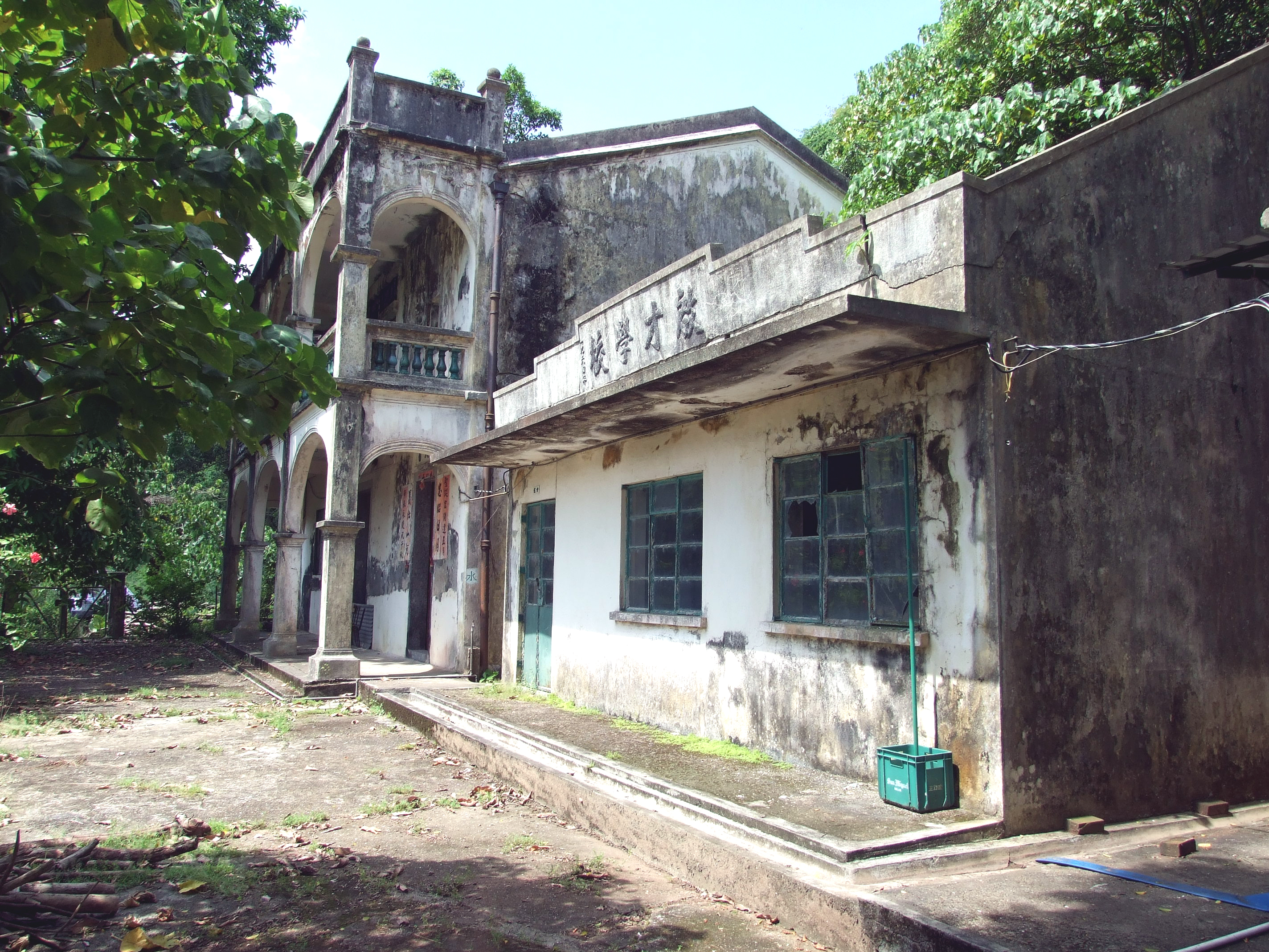 沙頭角谷埔協天宮及啟才學校